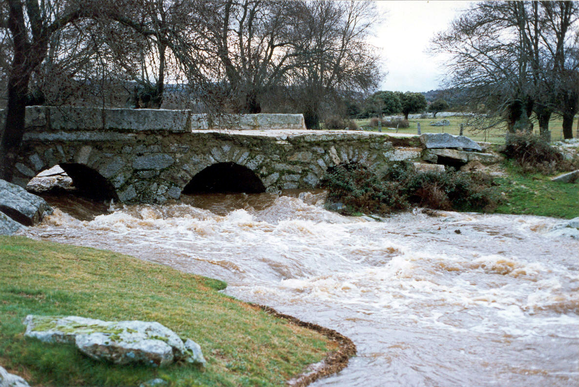 Río Gamo a su paso por la Dehesa de Rivilla